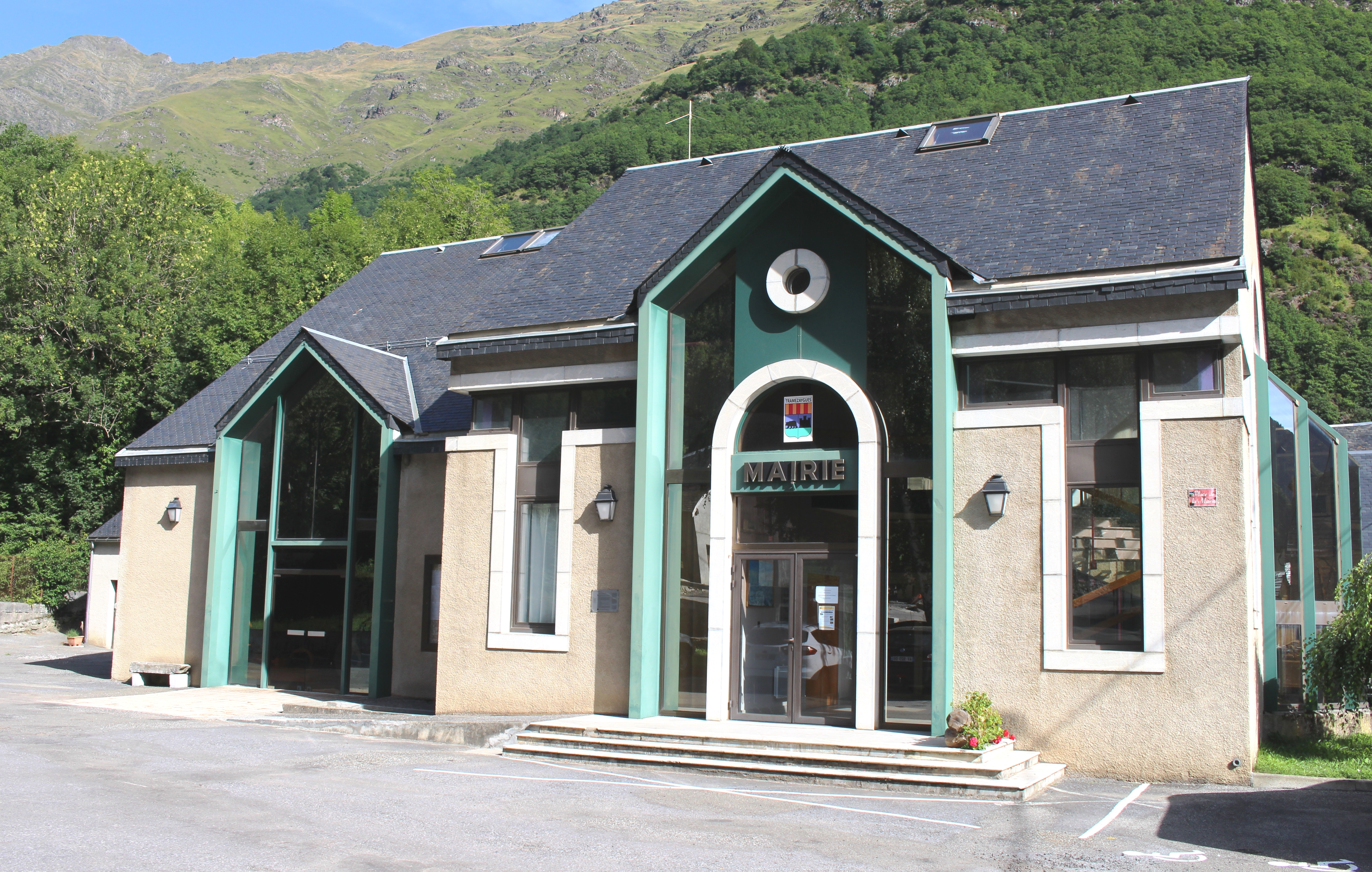 Mairie de Tramezaïgues (Hautes-Pyrénées)